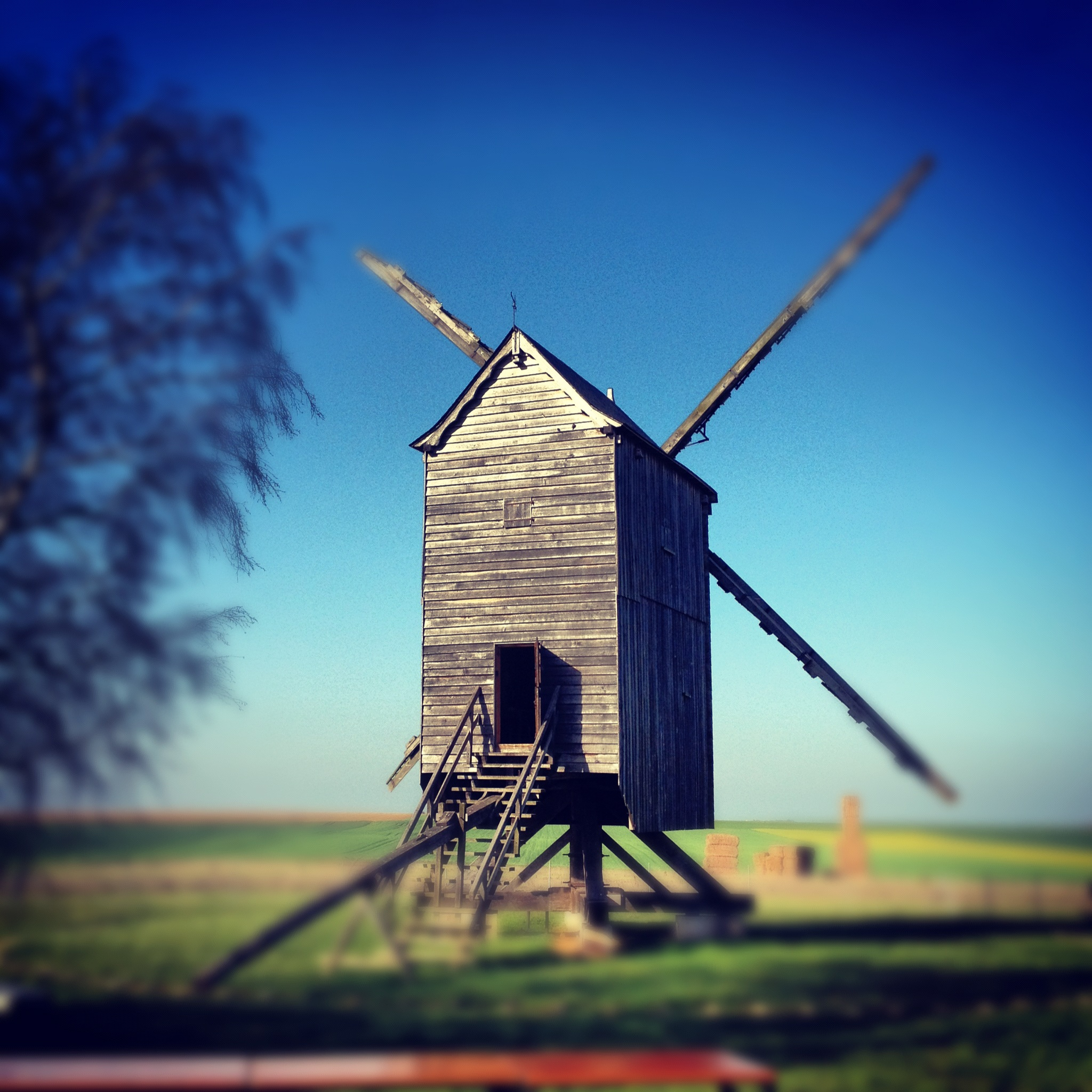 Photo du moulin de Maves